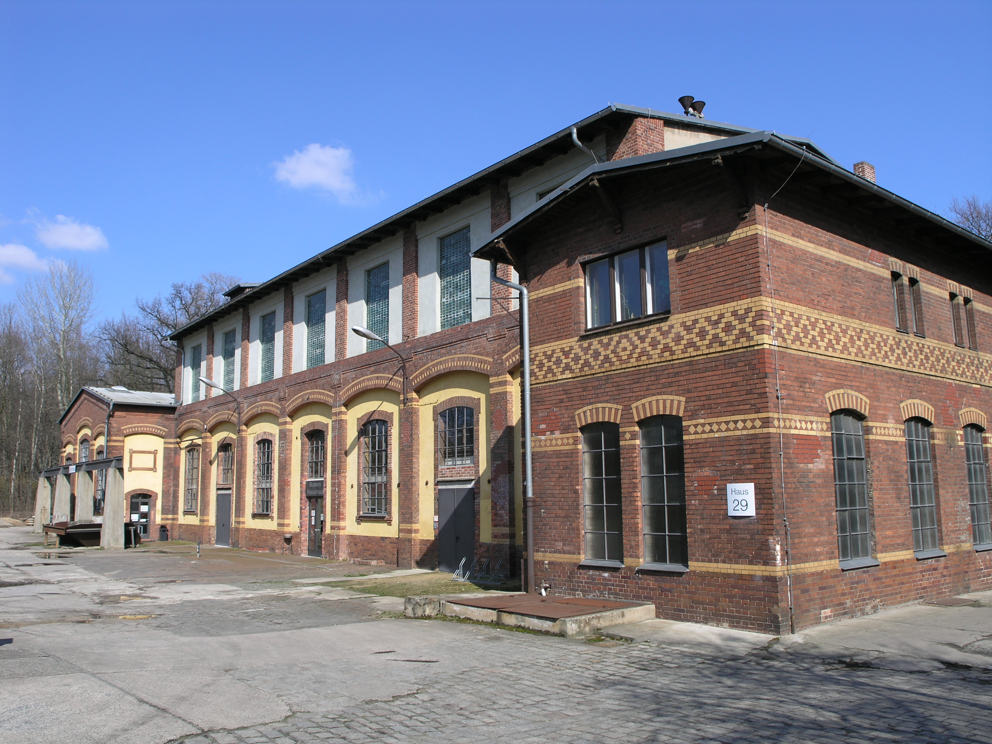 KEH; Museum Kesselhaus und Bibliothek